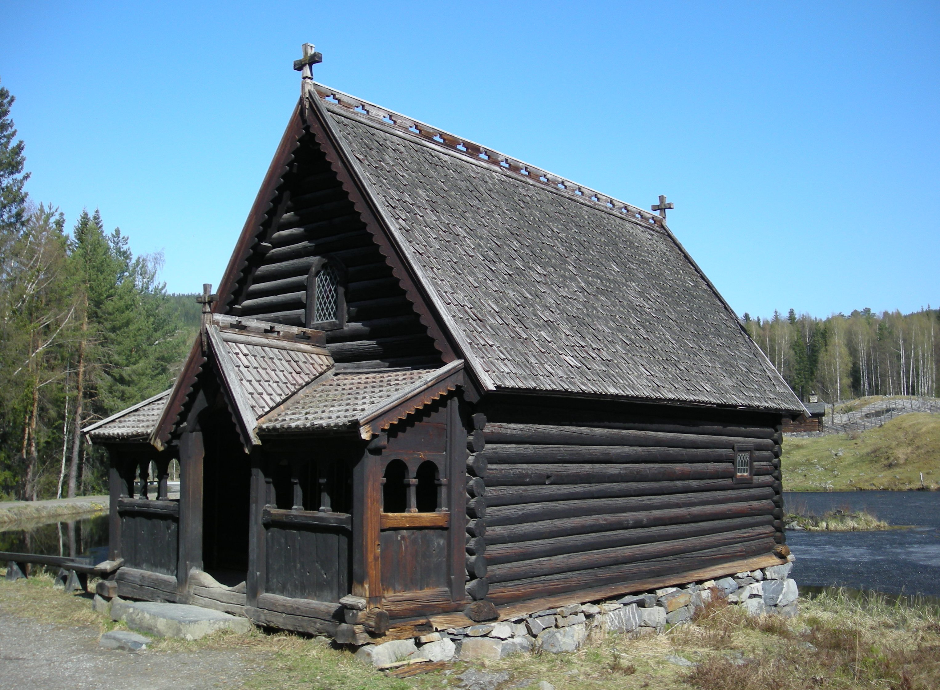 Fiskerkapellet på Maihaugen slik det står i dag ved Breisjøen.